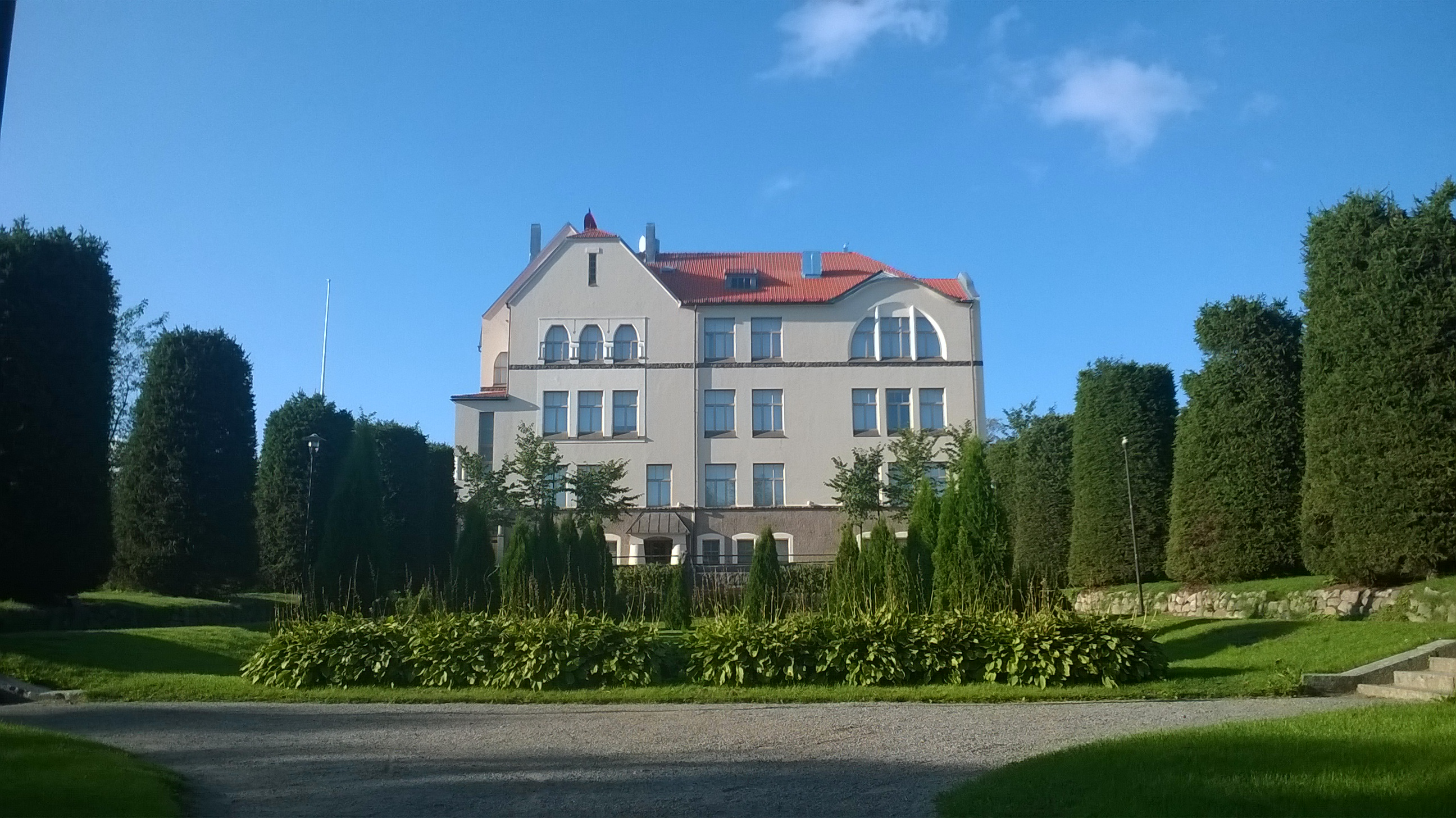 Koulupuisto